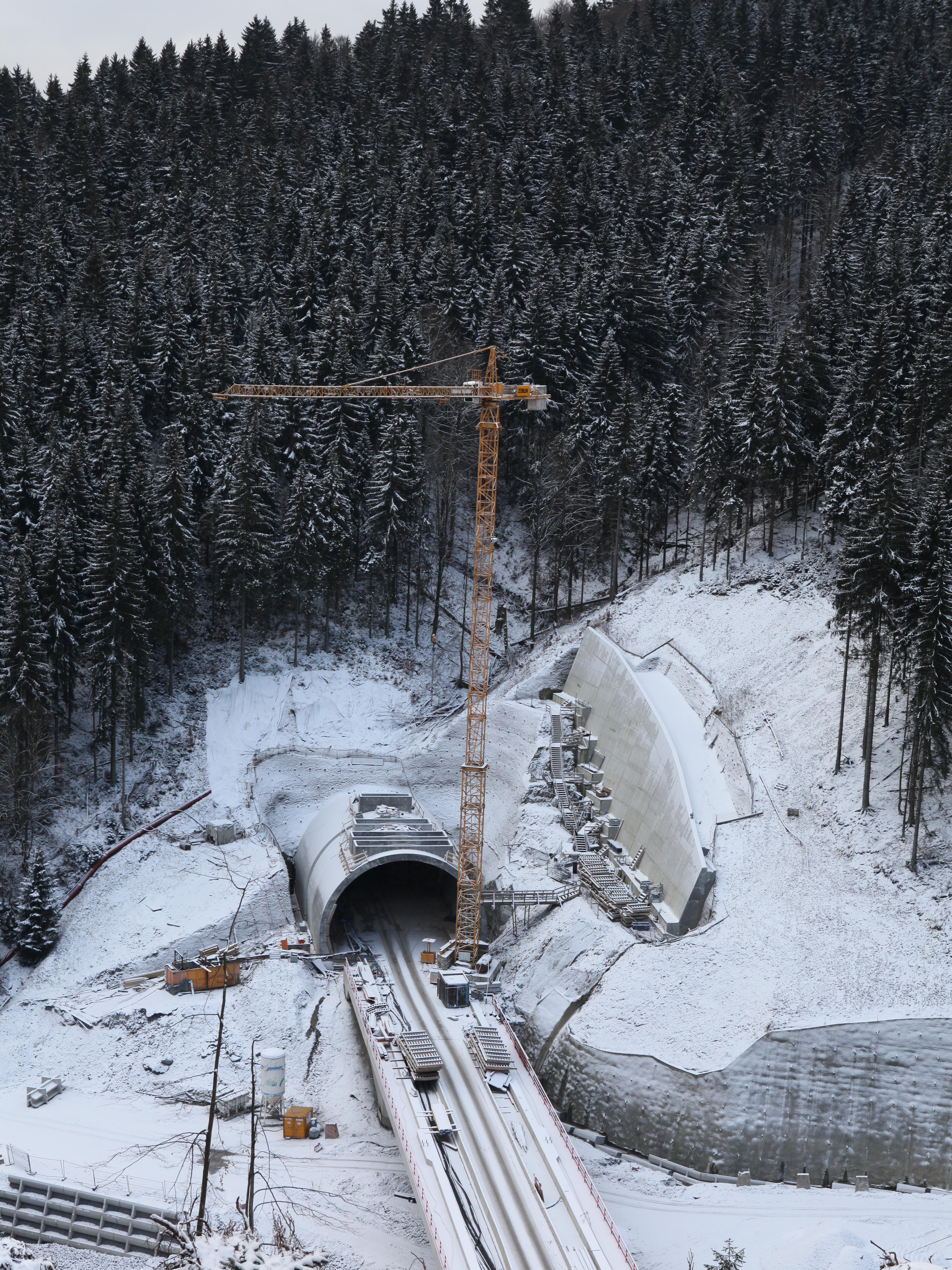 Tunnelportal Nord des Bleßbergtunnels bei Goldisthal am Großen Saubach